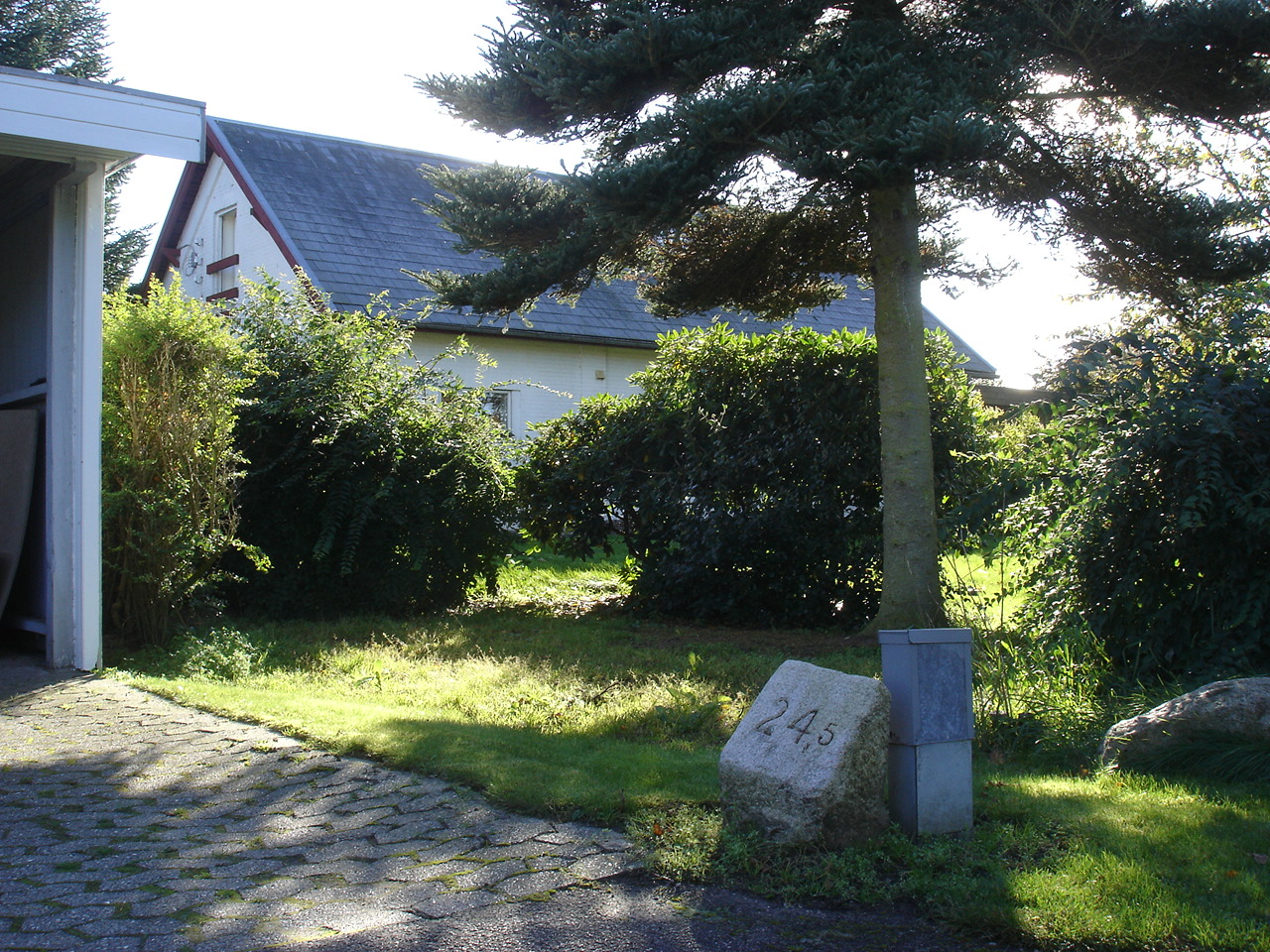 Ølholm Station fra Ø med km-sten: 24,5 km fra Horsens